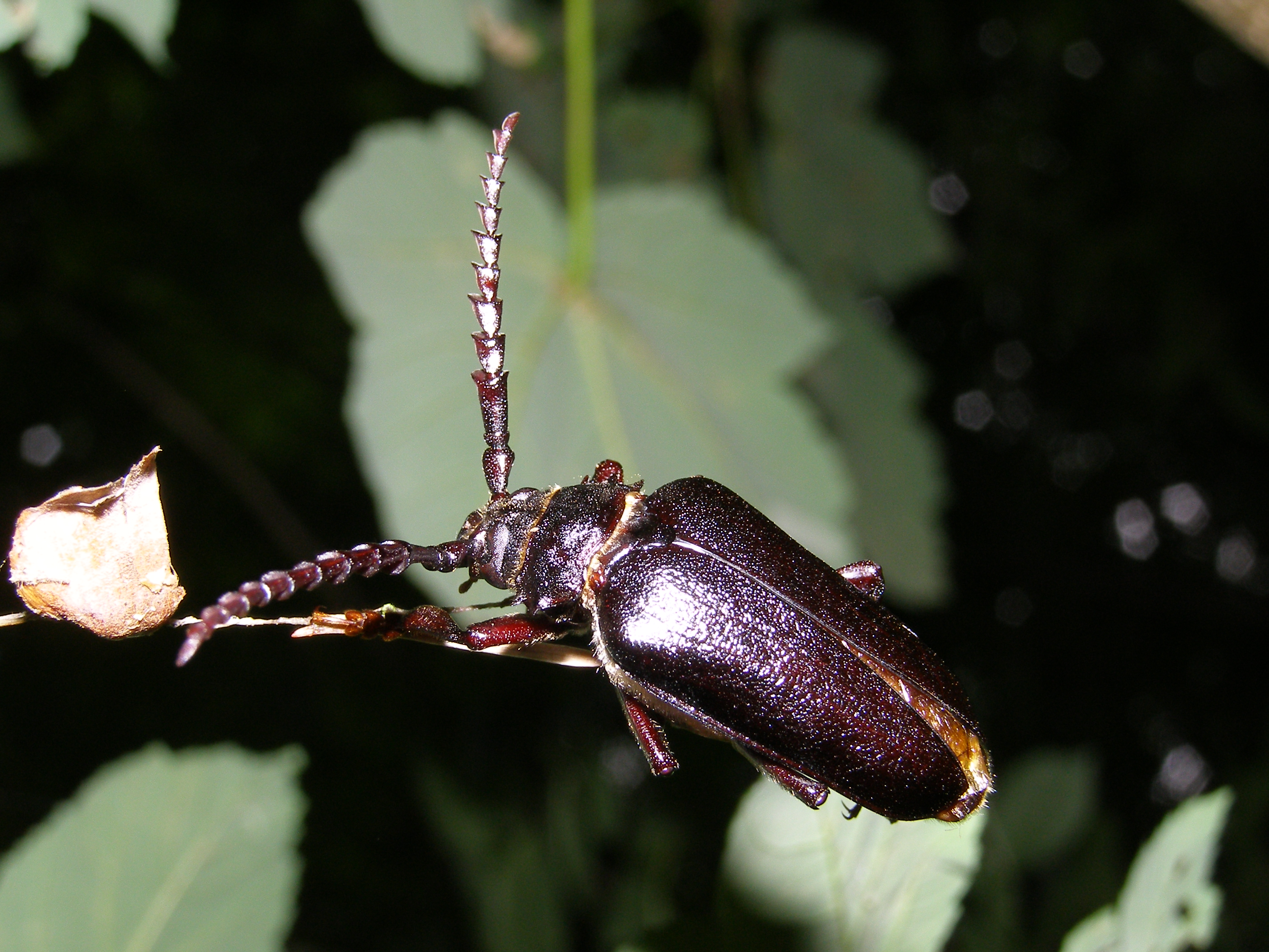 Unbestimmter Käfer, aufgenommen in der Mecklenburgischen Schweiz